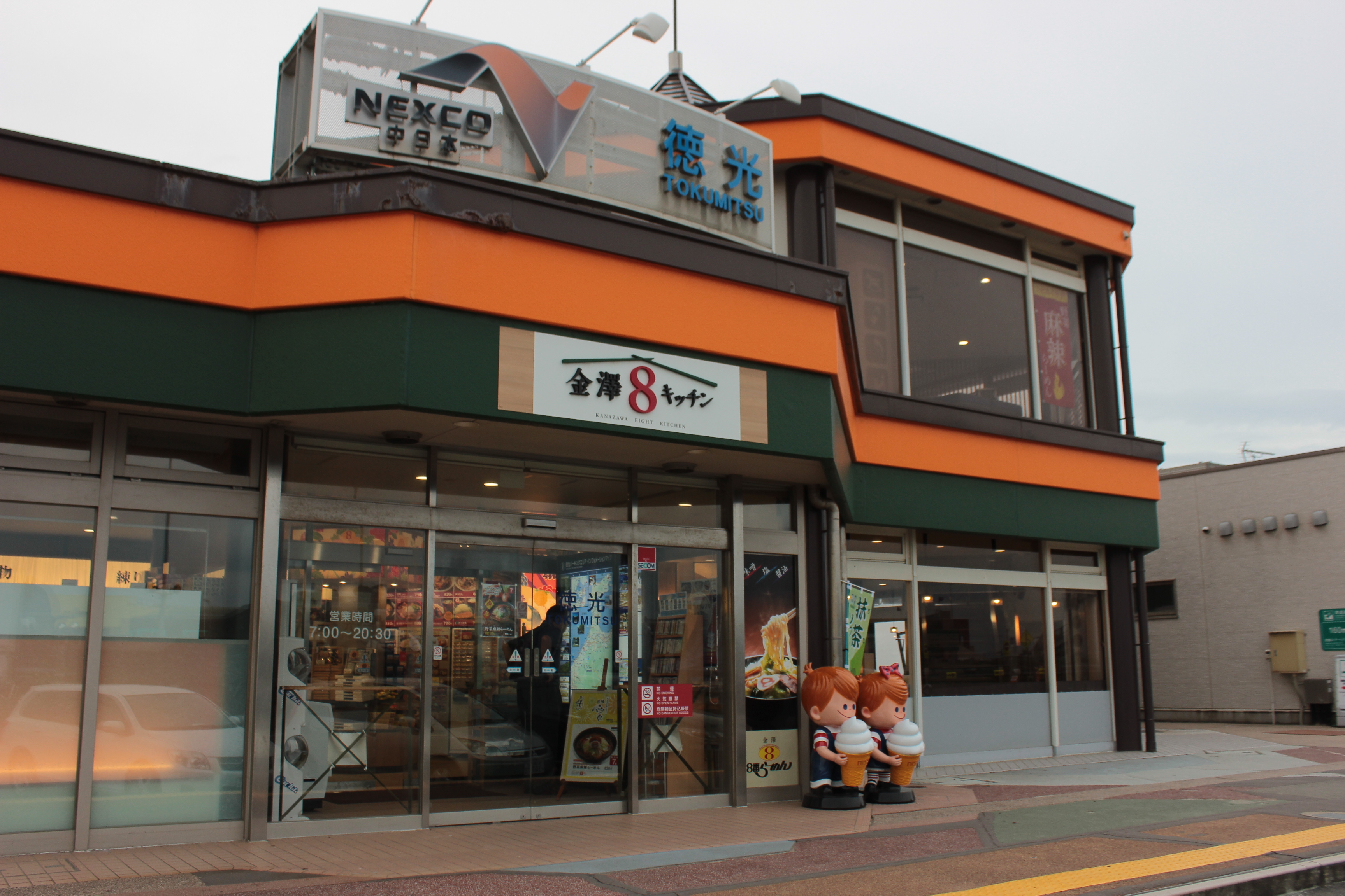 徳光パーキングエリア（下り、新潟方面） Canon EOS Kiss X5